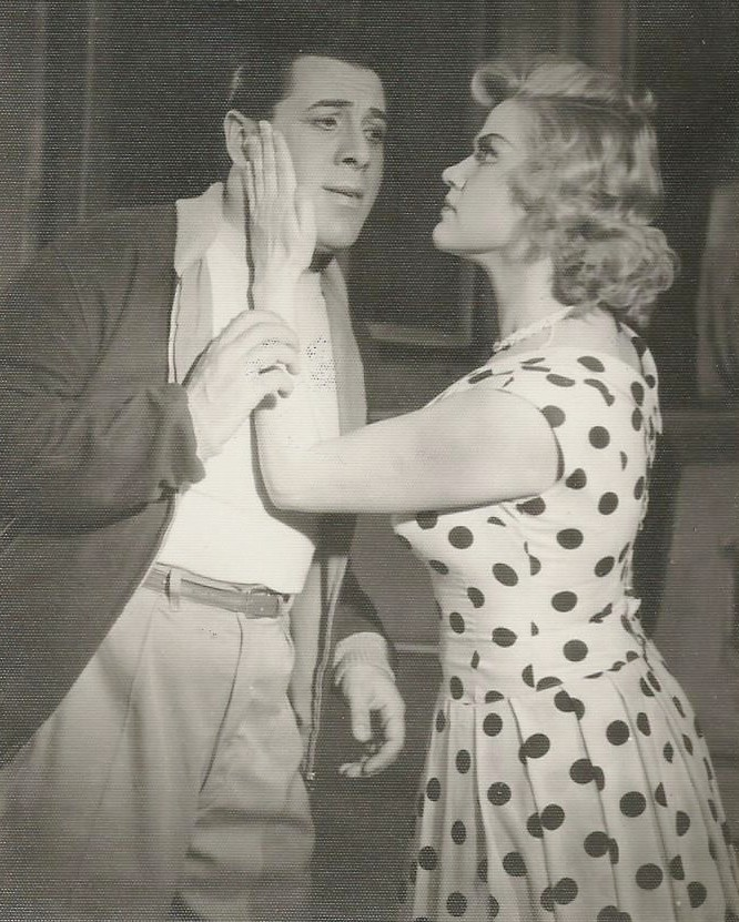 Mucsi Sándor (1926-2006) a Bástyasétány 77 szegedi előadásán Karácsonyi Magdával, Szegedi Nemzeti Színház